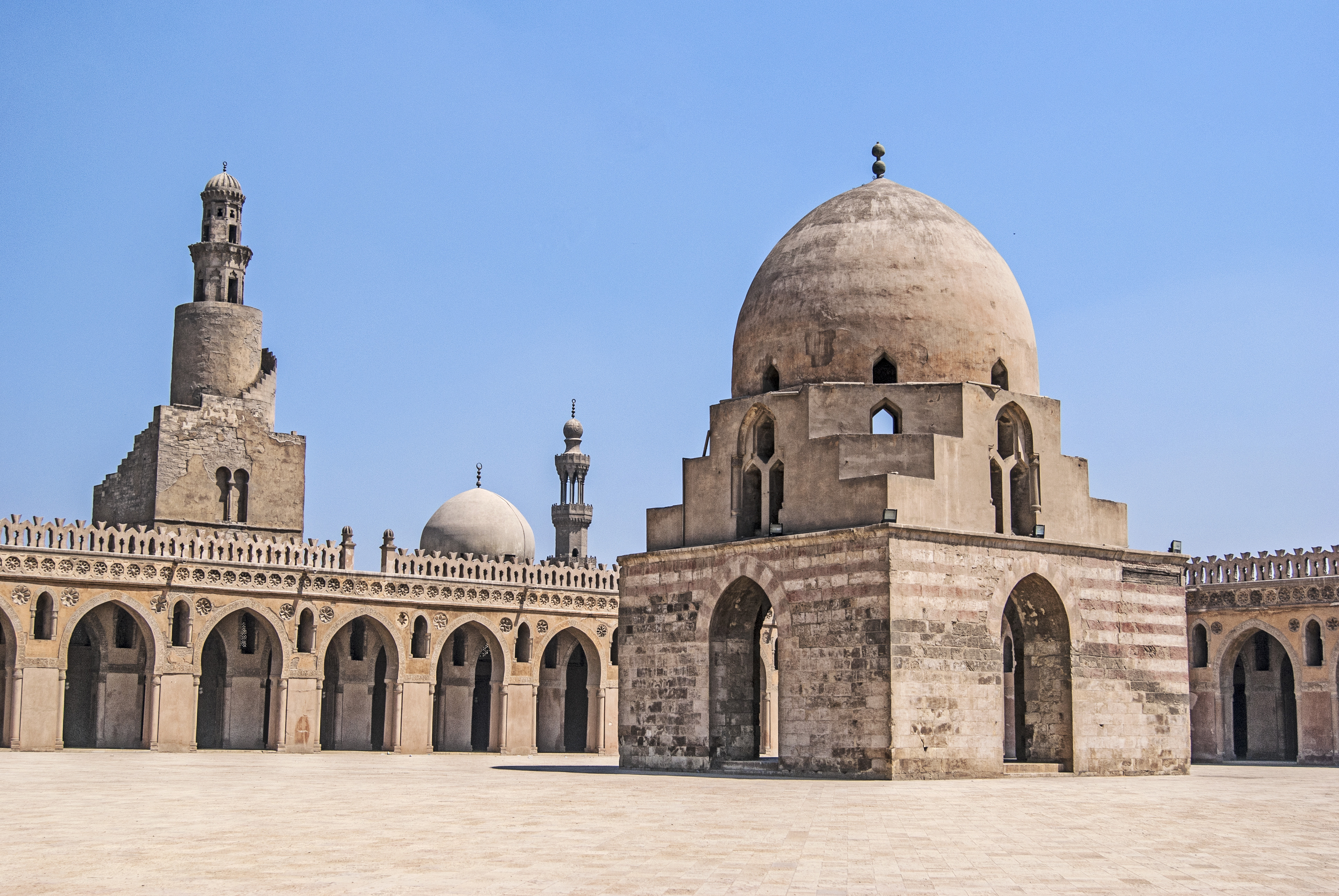 بهو و مأذنه مسجد احمد بن طولون